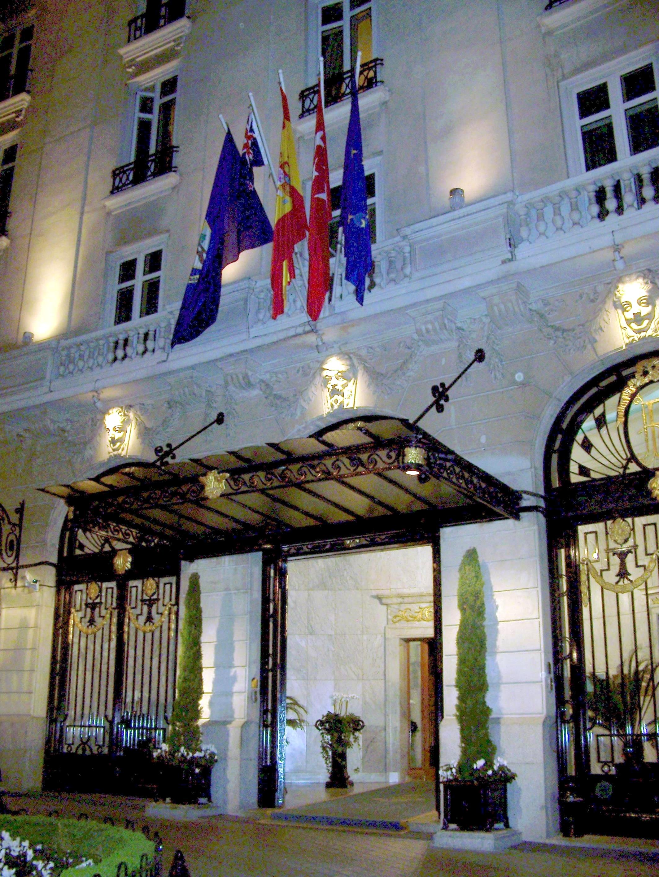 Hotel Ritz, Madrid: entrada principal Plaza de la Lealtad, de noche.